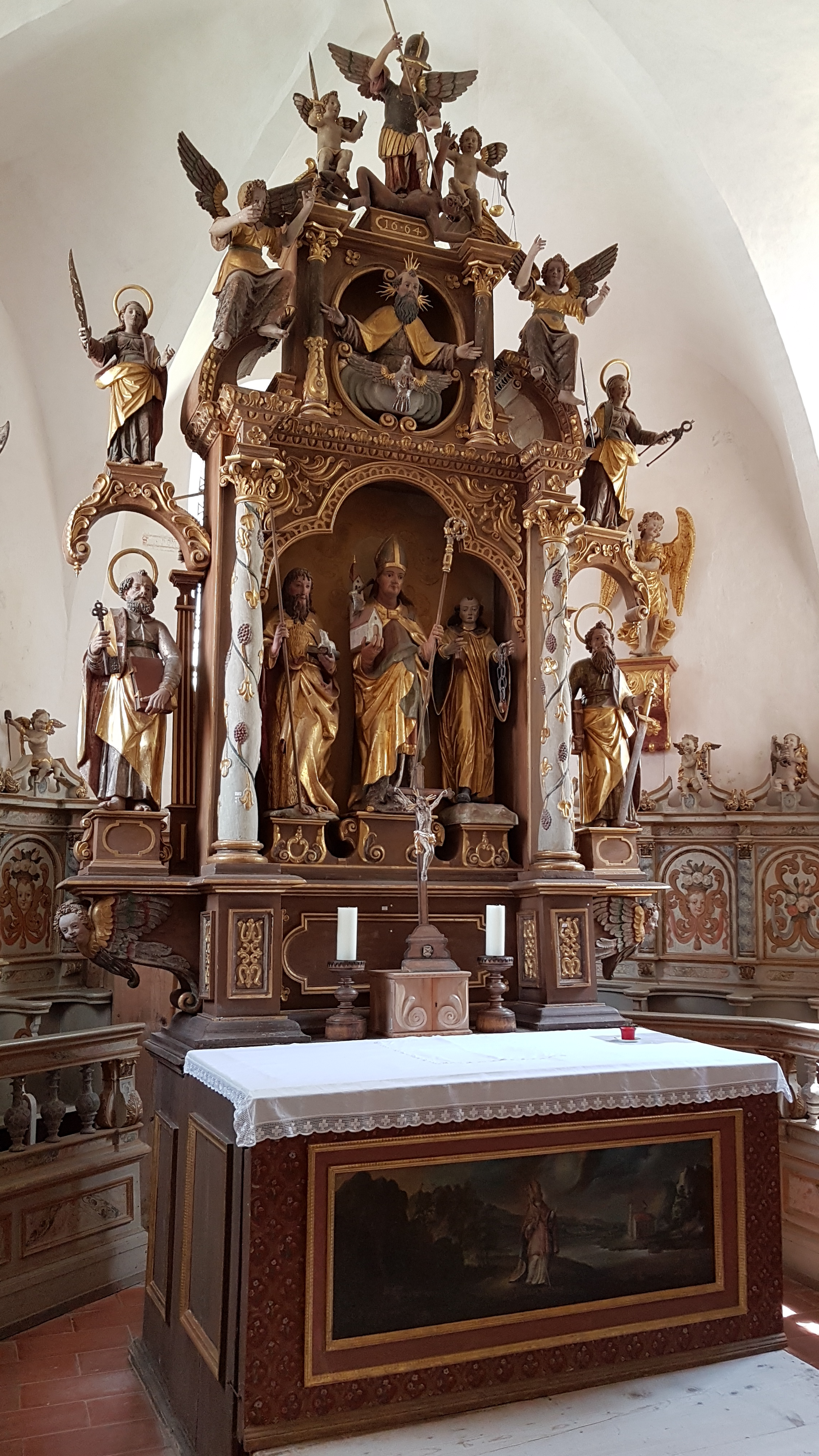 Thaining, Kirche St. Wolfgang, Hochaltar von 1664 (David Degler) mit manieristischer Formensprache.